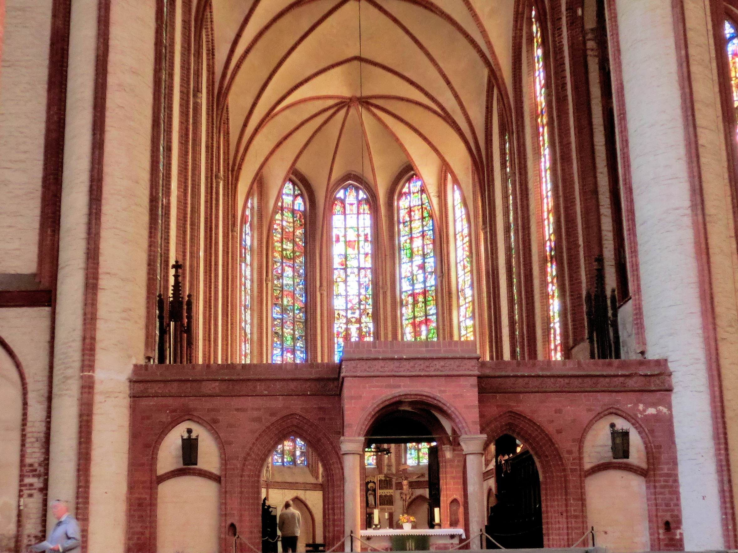 Stendal Dom Lettner und Chor